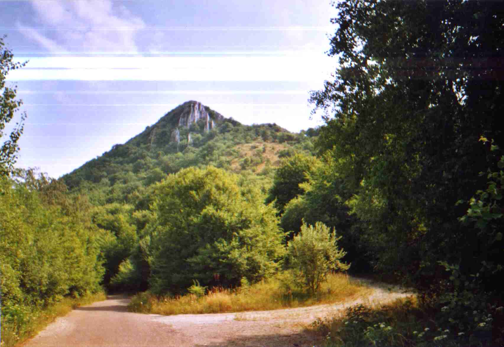 Hills of Bélapátfalva, Hungary